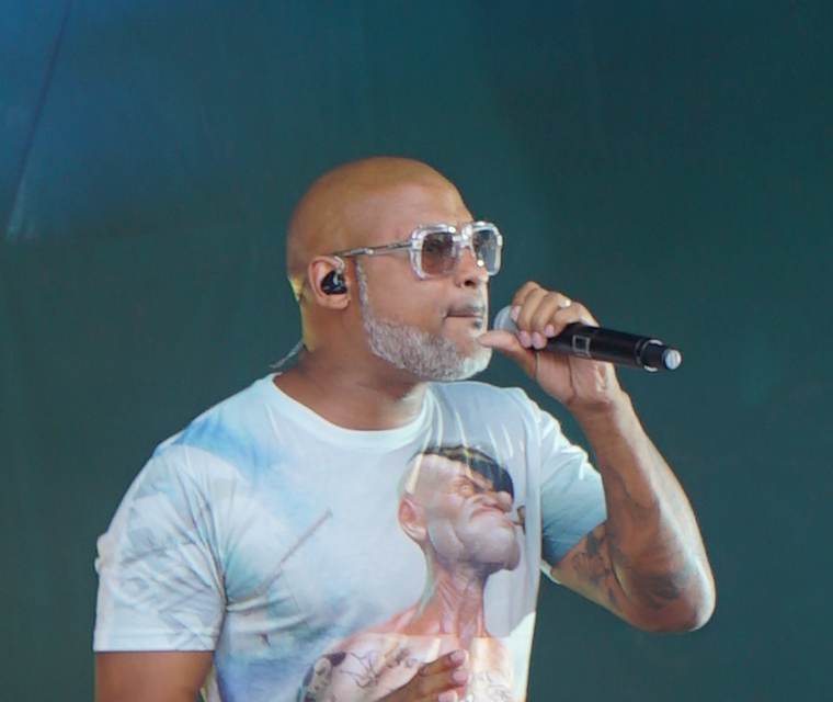 collectif métissé en concert pour la fete patronel de Fismes.